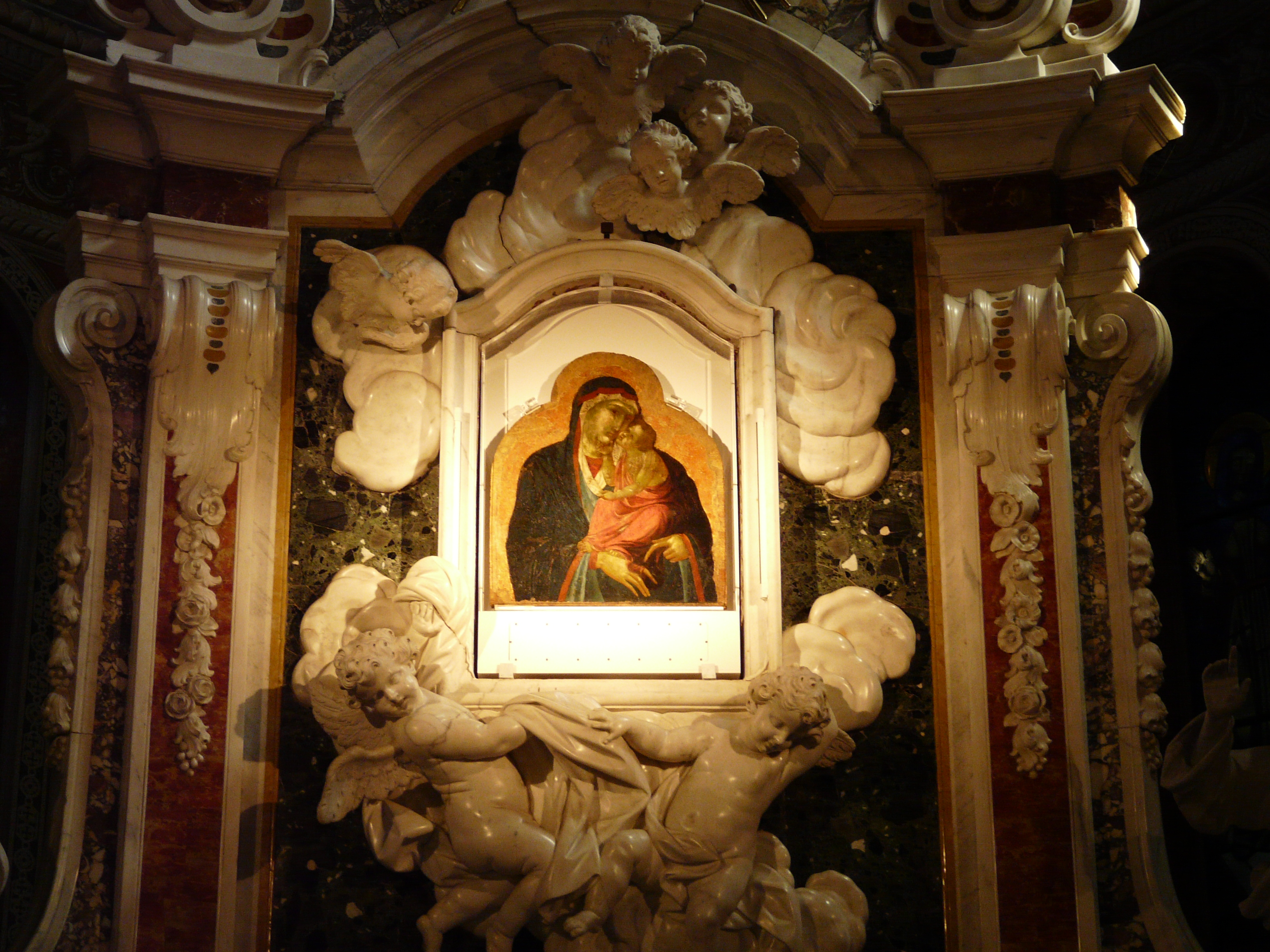 Immagine della Madonna del Ponte, Santuario di Nostra Signora del Ponte, Lavagna, Liguria, Italia